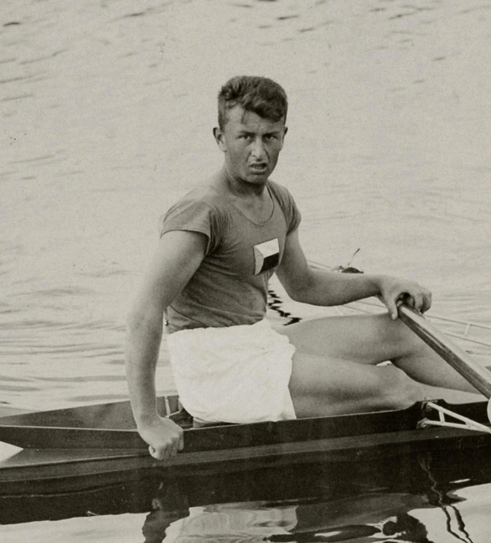 Olympische Spelen Amsterdam, Nederland, 1928: Roeien. De Tsjechische Joseph Straka werd met zijn skif 6e.